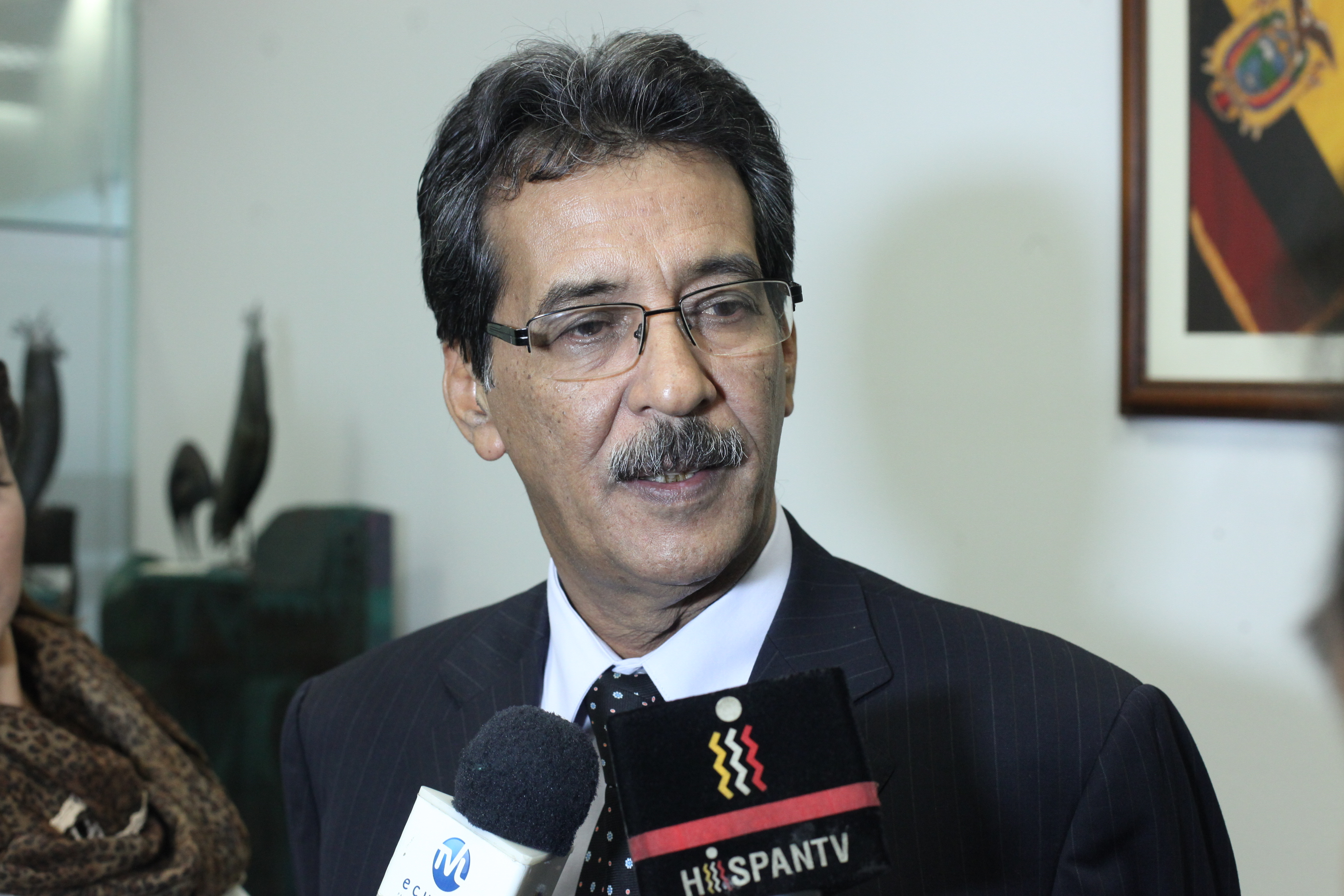 Fotografía: Hugo Ortiz / Asamblea Nacional Rosana Alvarado, primera Vicepresidenta de la Asamblea Nacional junto a los Asambleístas Diego Vintimilla, María Augusta Calle y Paola Pabón, reciben la visita de Hach Ahmed Baricalla, Ministro de la República Árabe Saharaui Democrática. Tema: Relaciones con América Latina y El Caribe